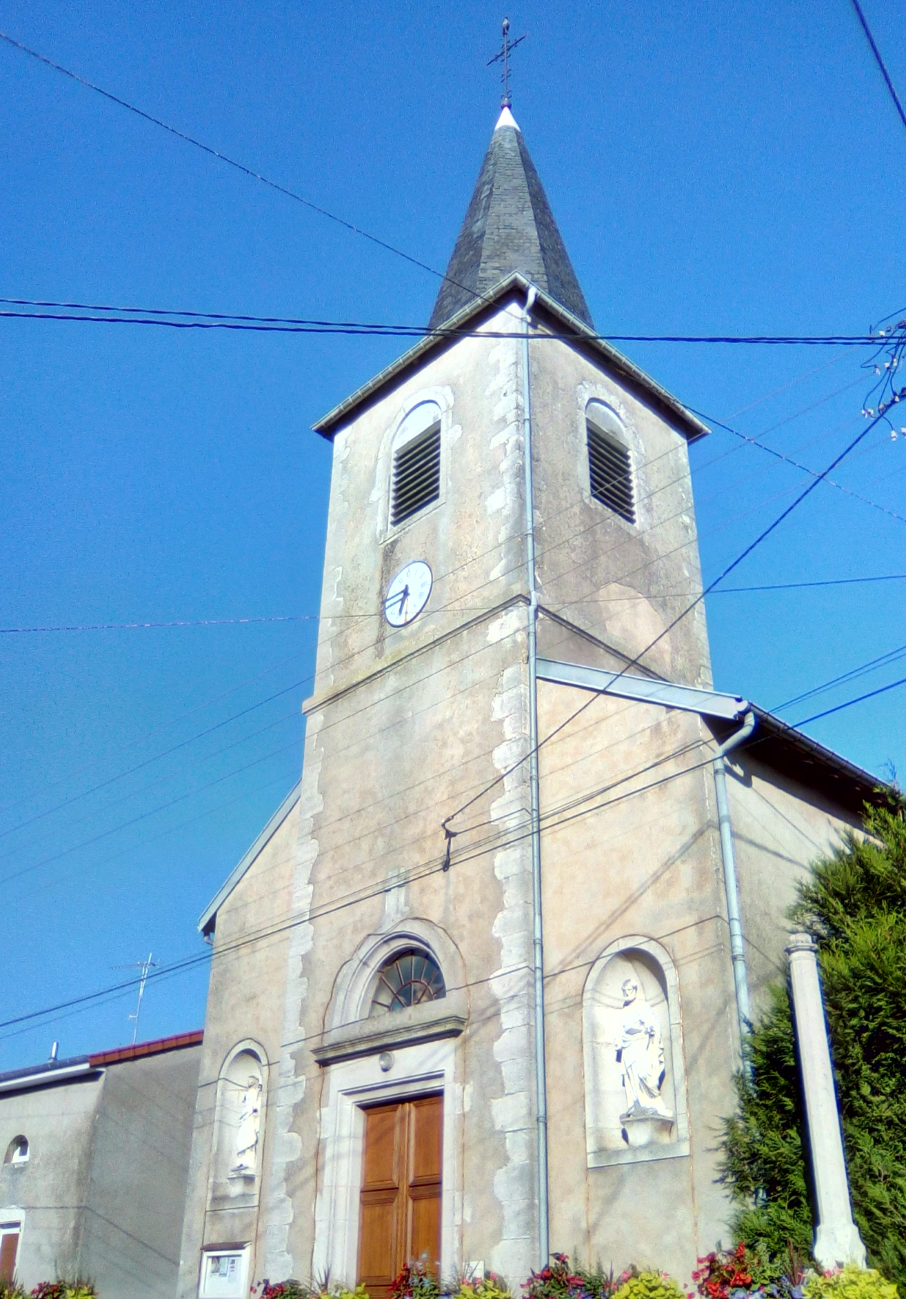 église Sainte Libraire d'Hammeville